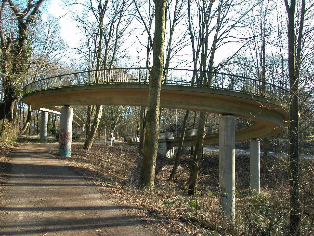 Fußgängerbrücke über die B1 vom Kahlenbergwald zum Witthausbusch Kamera-Position: 51°24′50.56″N 6°53′30.14″E / 51.4140444°N 6.8917056°E Objekt: [1]